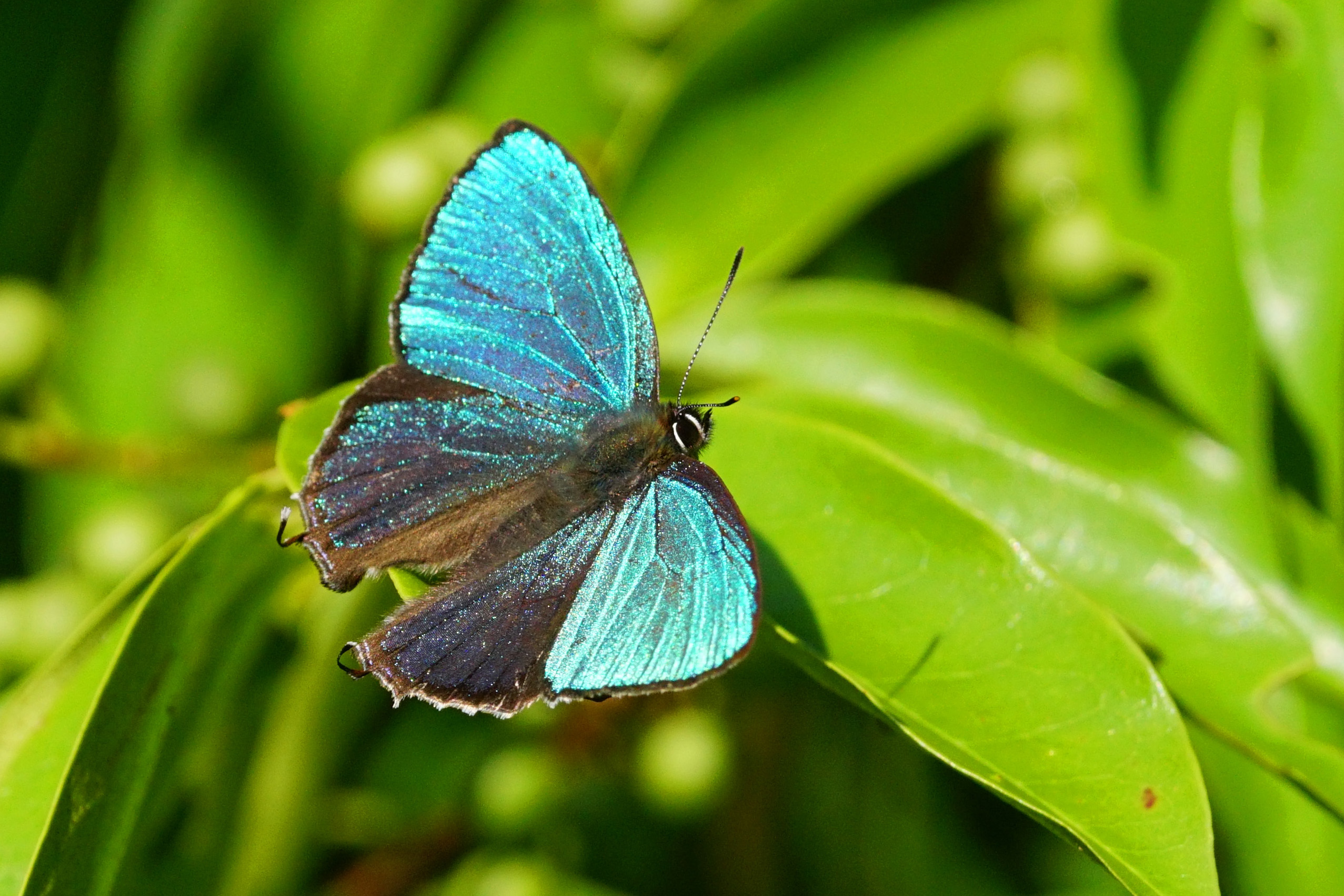 霧社翠灰蝶 Chrysozephyrus mushaellus